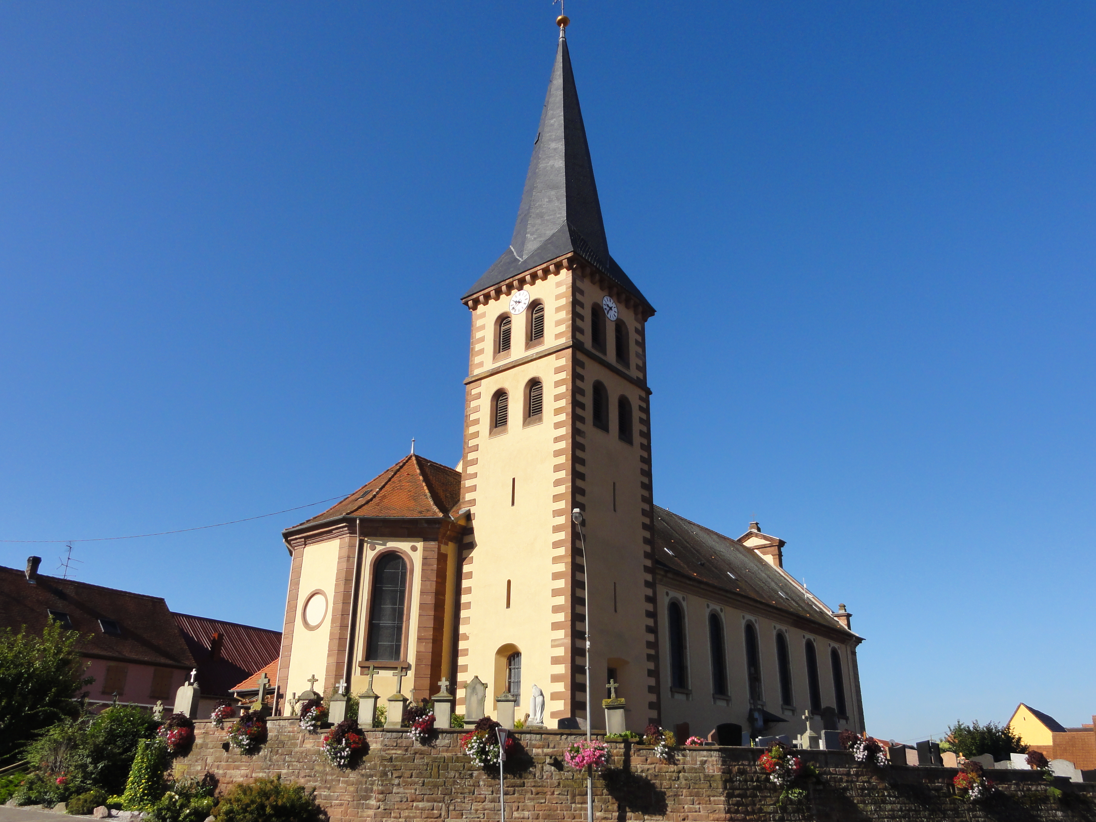 Alsace, Bas-Rhin, Niederschaeffolsheim, Église Saint-Michel (IA00061720).